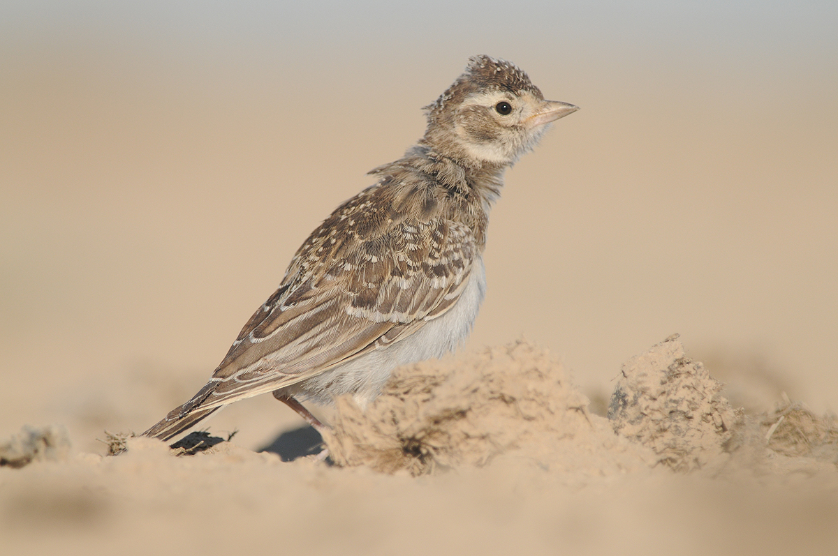 Calandrella brachydactyla Škovránka krátkoprstá Kolshengel